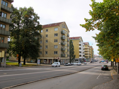 Lägenhetsbyggnader, på södra sidan av Redbergsvägen, som tillhör primärområdet Olskroken men hör till stadsdelen Gårda, i Göteborg.